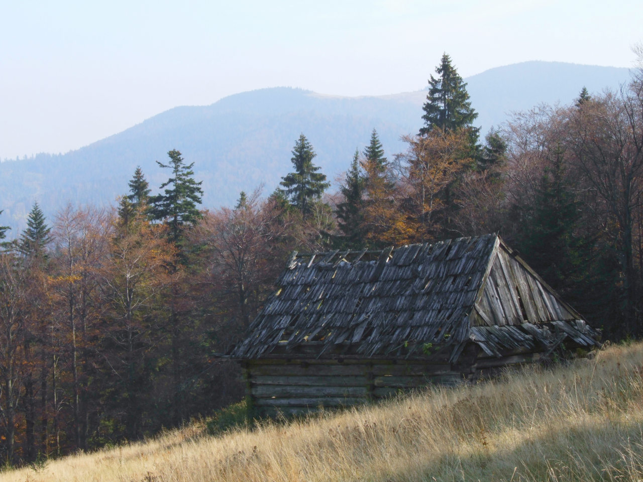 Polana Adamówka. Widoczny Gorc